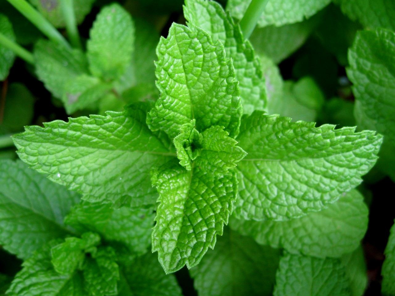 Mint leaves.